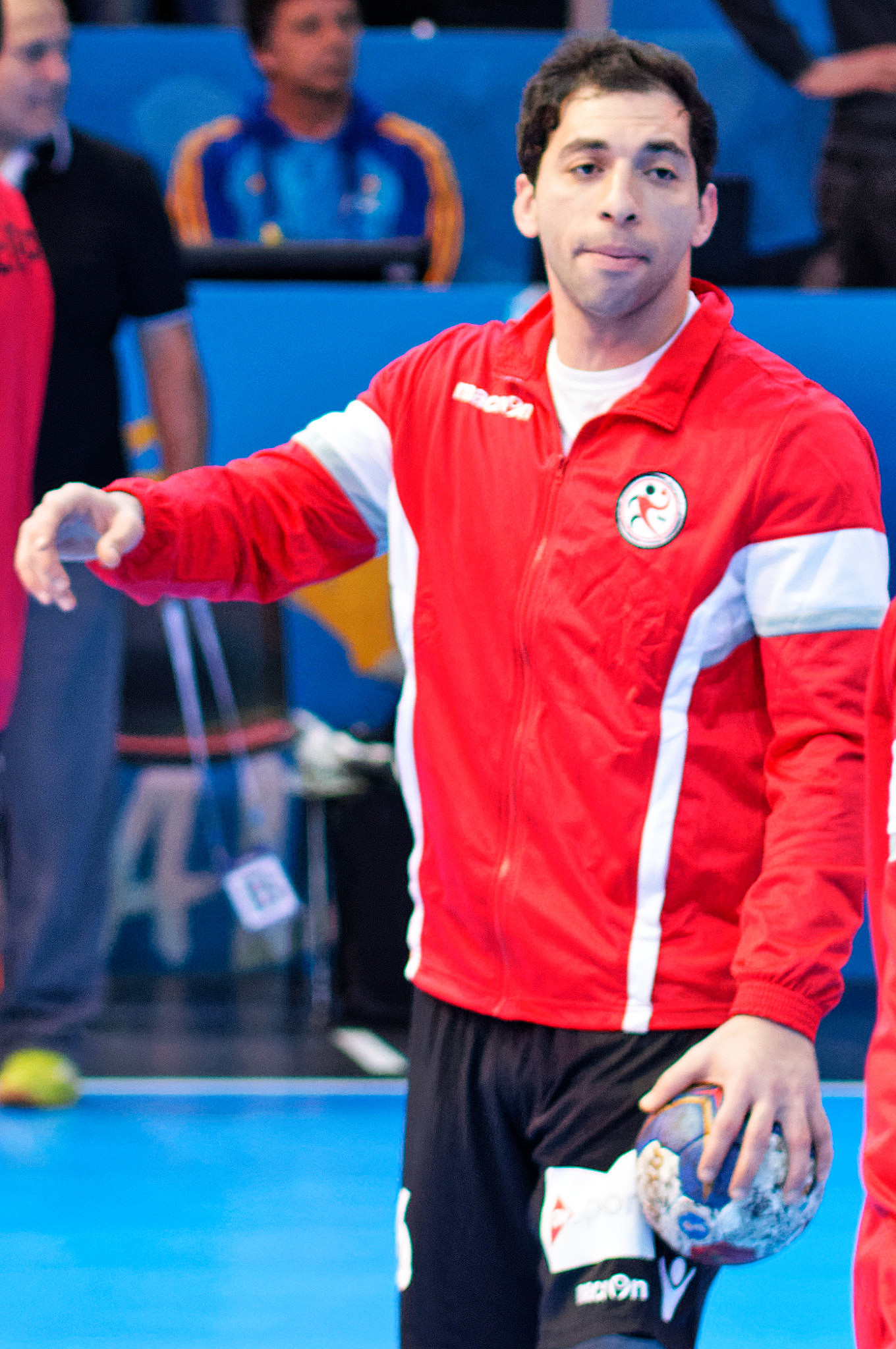 Match de la phase préliminaire du championnat du monde masculin de handball 2017 entre l'Egypte et le Danemark (Groupe D). A Bercy, le 14 janvier 2017.